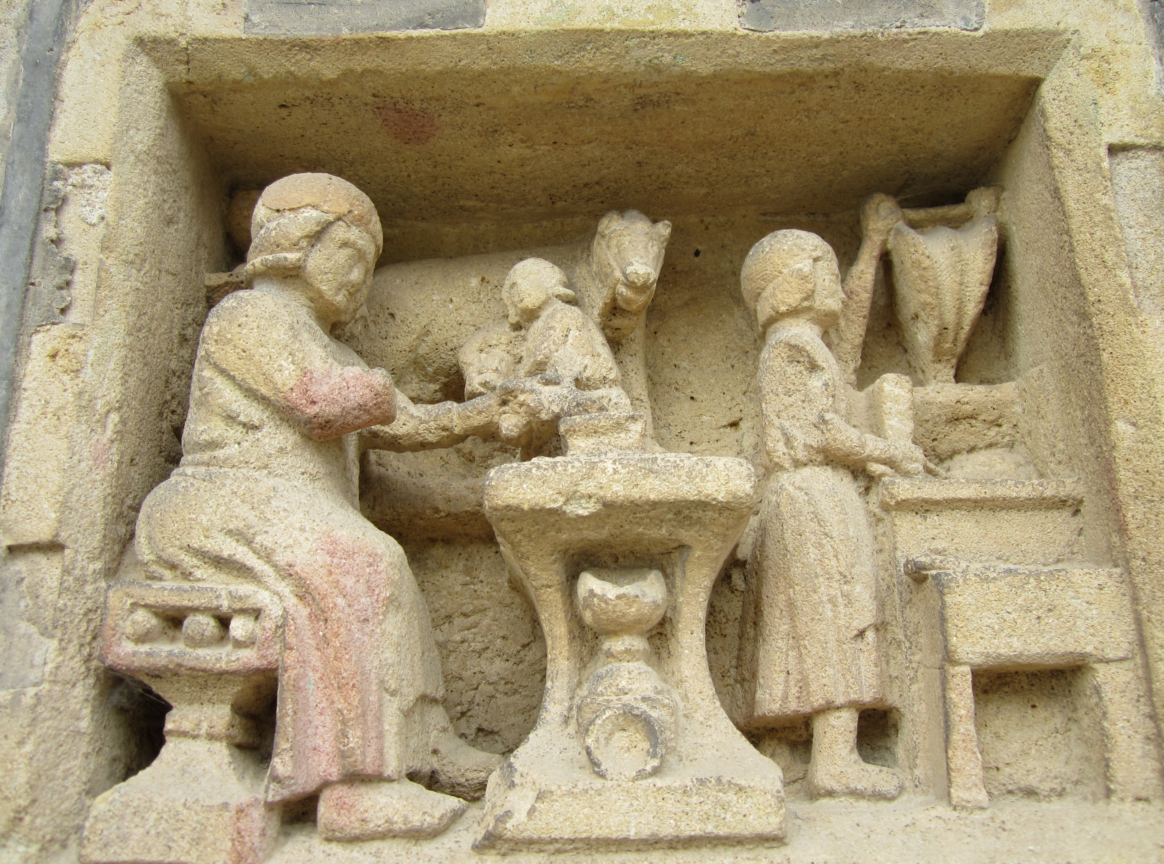 Église Saint-Éloi de Lieusaint (Manche)